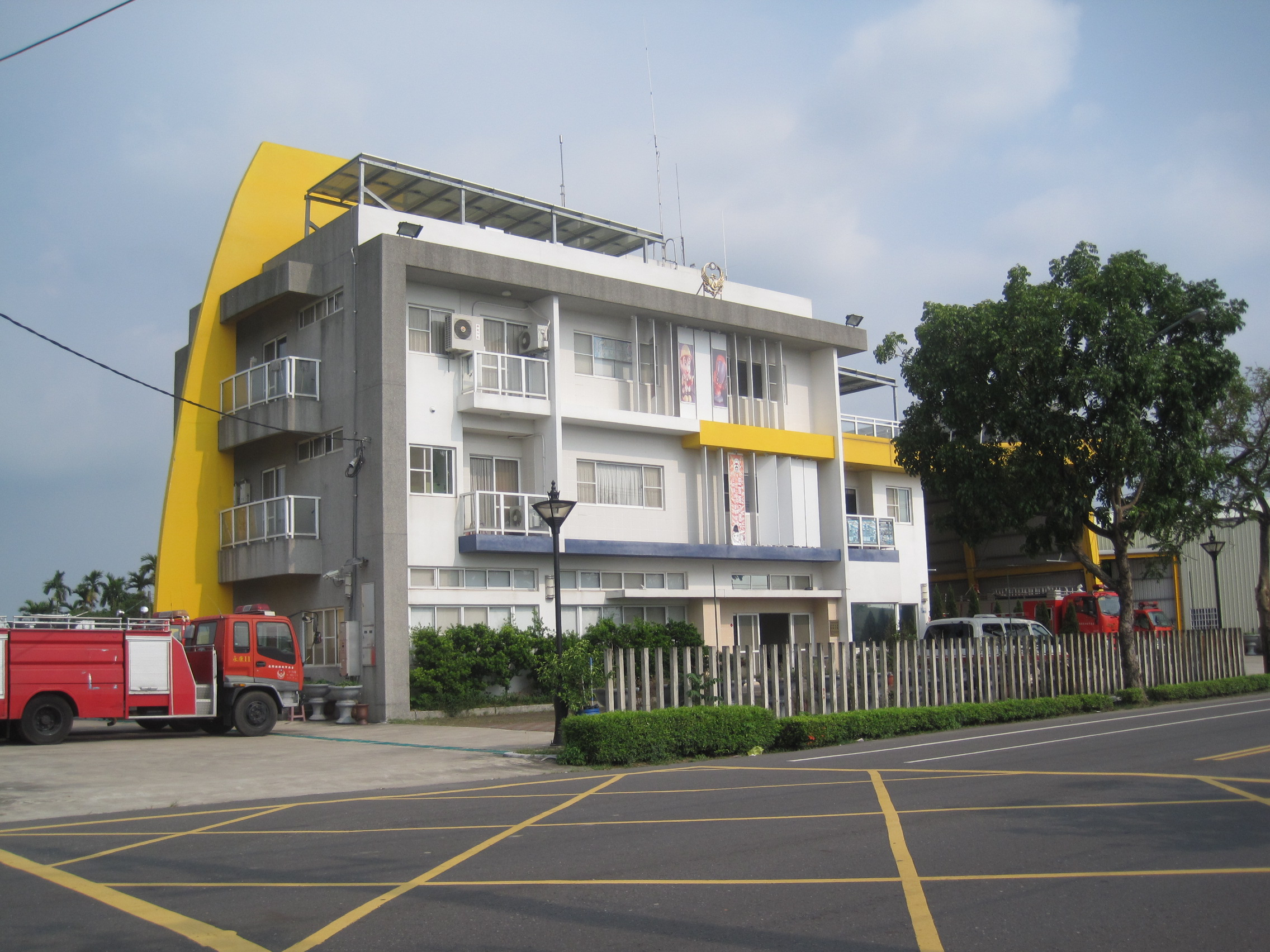 臺南市政府消防局第五大隊保西分隊